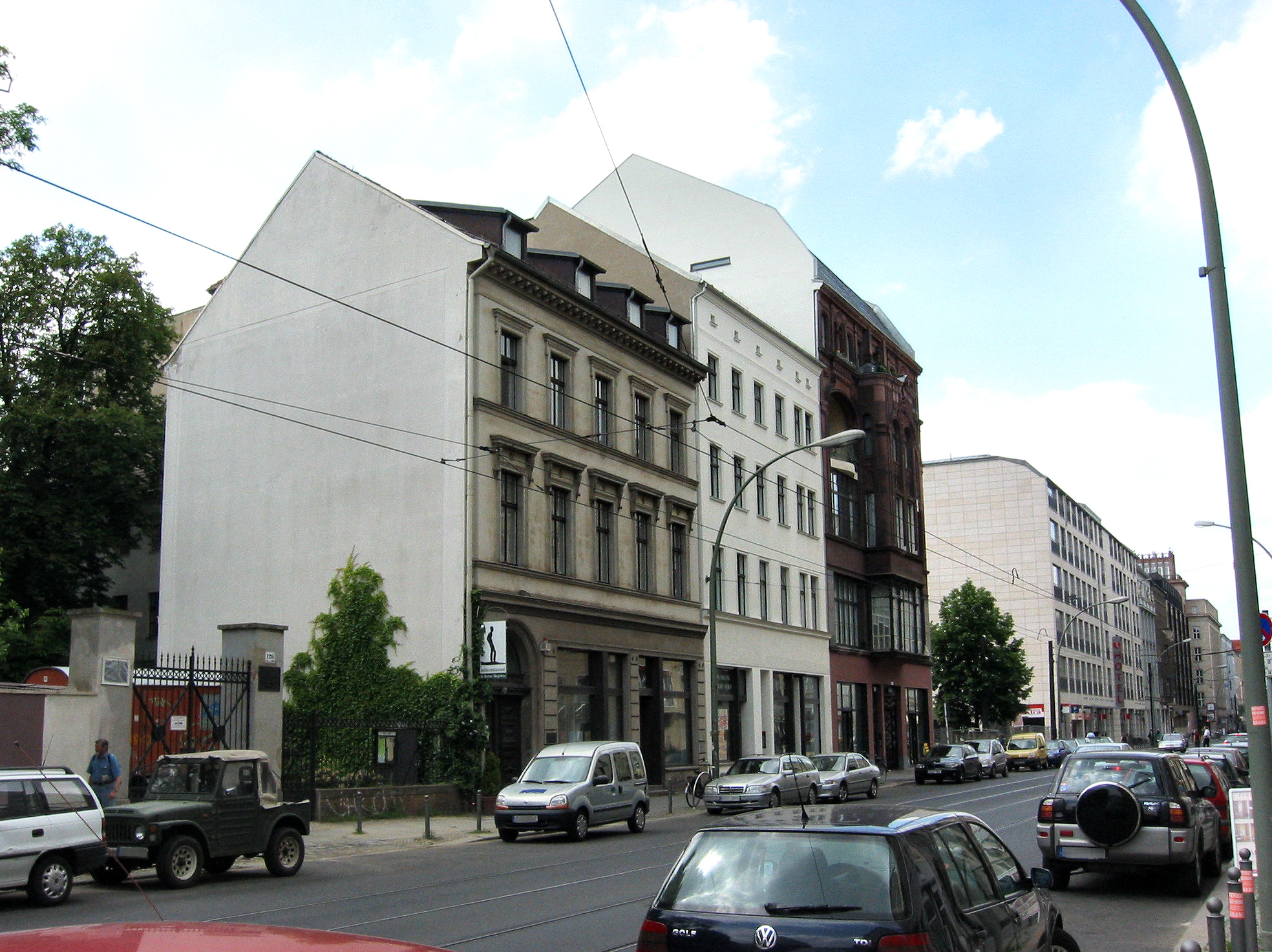 Die drei unter Denkmalschutz stehenden Häuser Chausseestraße 123-125